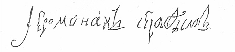 Снимок почерка Серафима Саровского